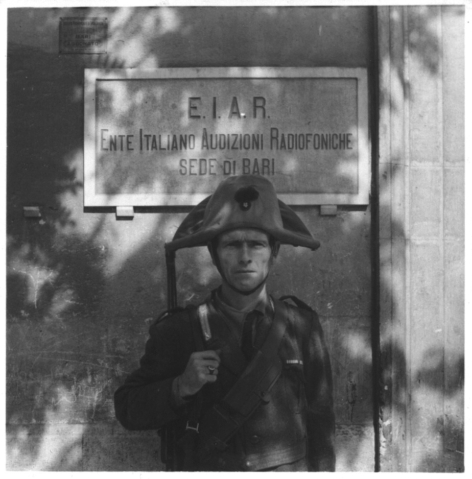 Carabiniere di guardia davanti all'ingresso della sede EIAR di Bari, Via Putignani 247.